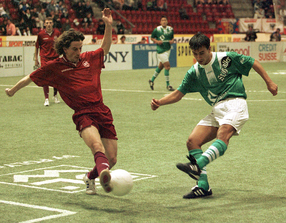 FCSG - Servette am Hallenmaster 1998